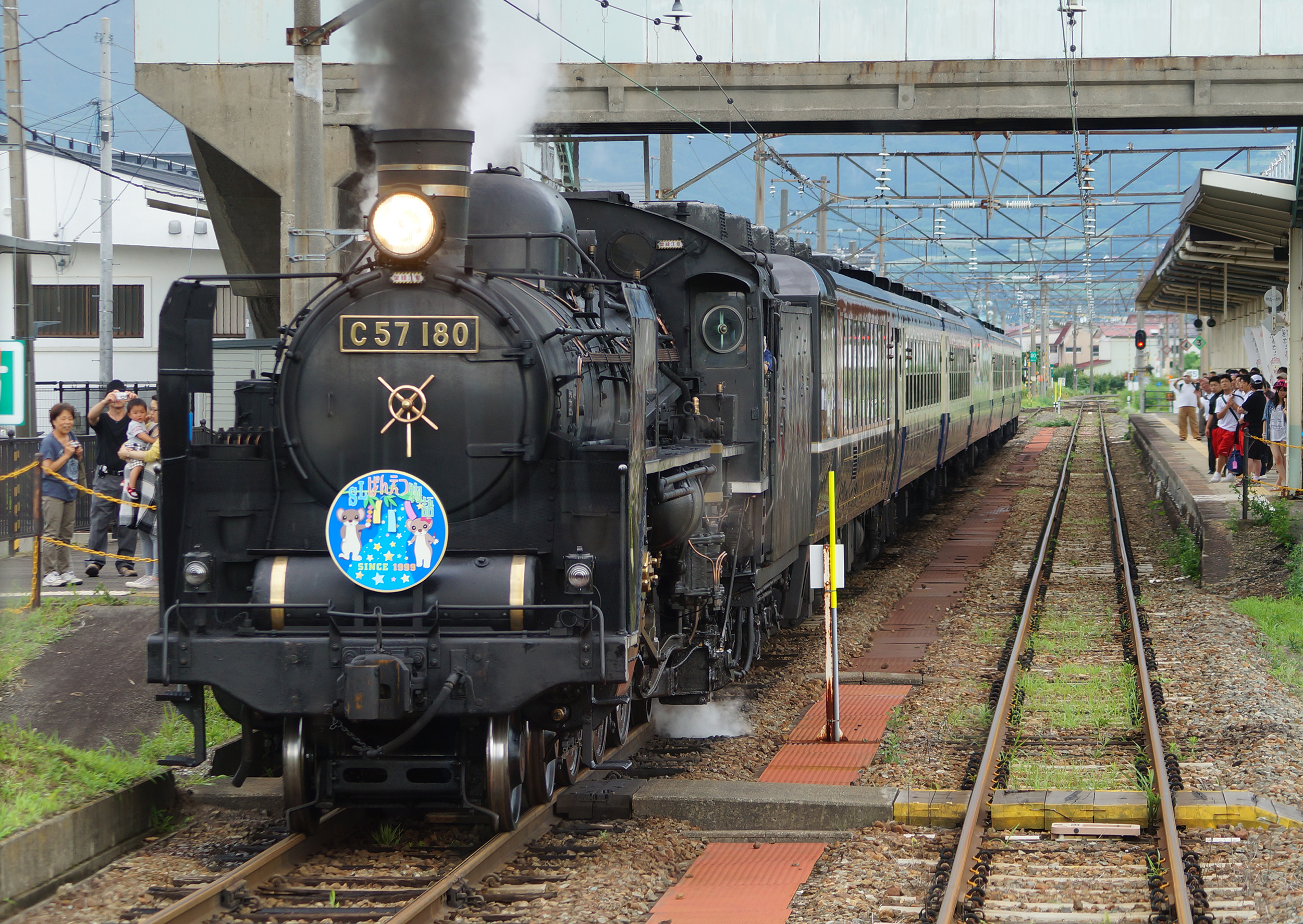 １番線停車中のばんえつ物語